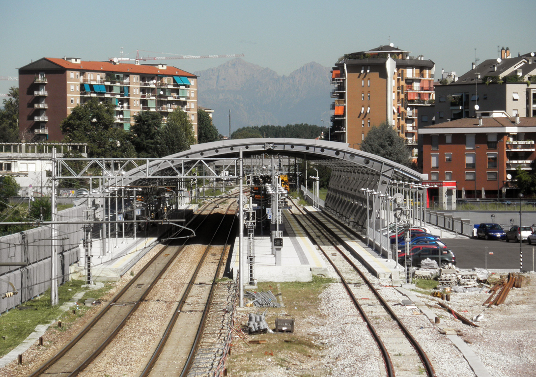 Vista panoramica della stazione di Milano Nord Affori.